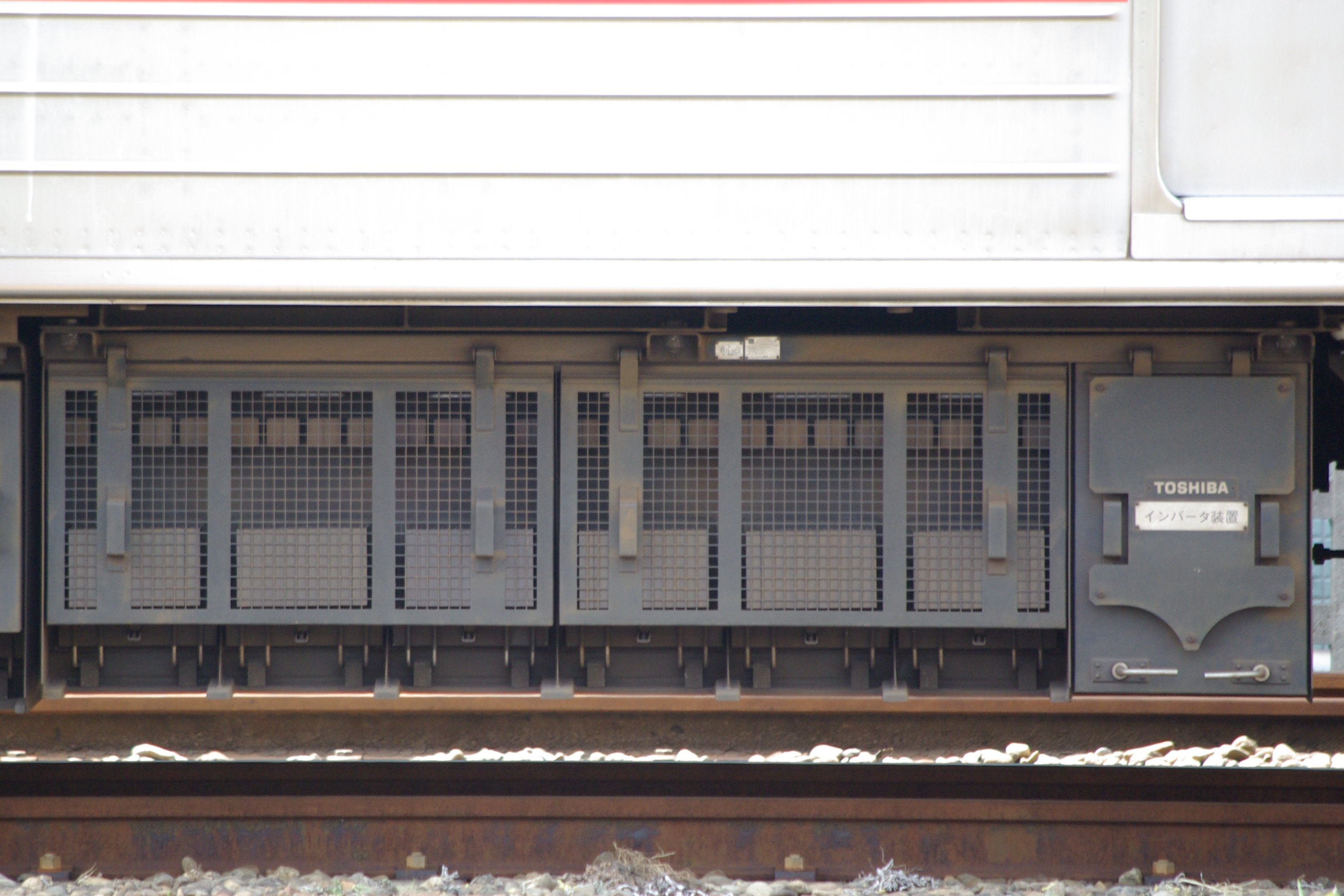 東急1000系のINV-020-A1形補助電源装置